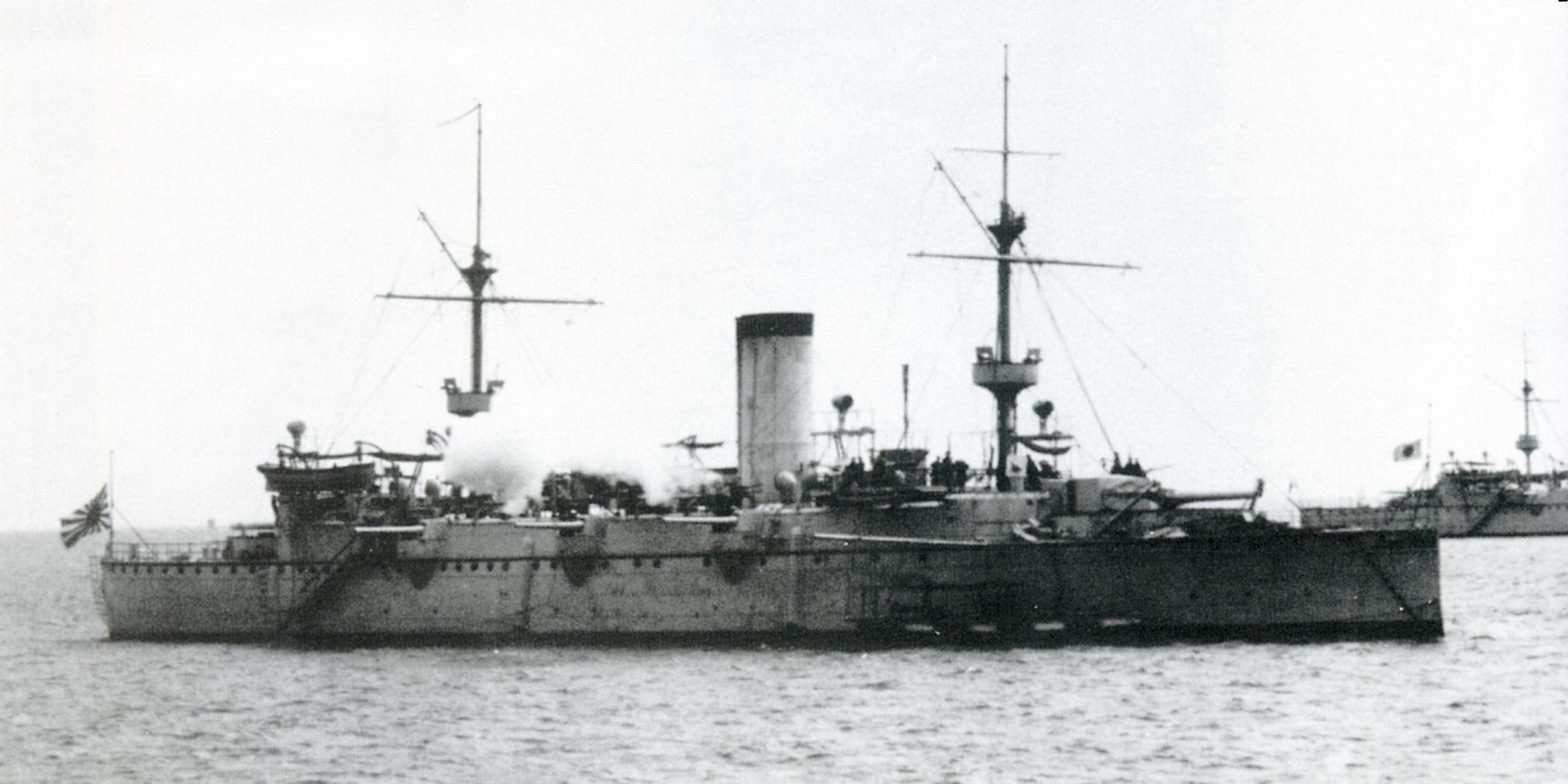 Japanese cruiser Naniwa firing salute at Kobe, 1887